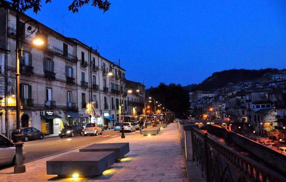 Scorcio di Corso Plebiscito nel centro storico di Cosenza